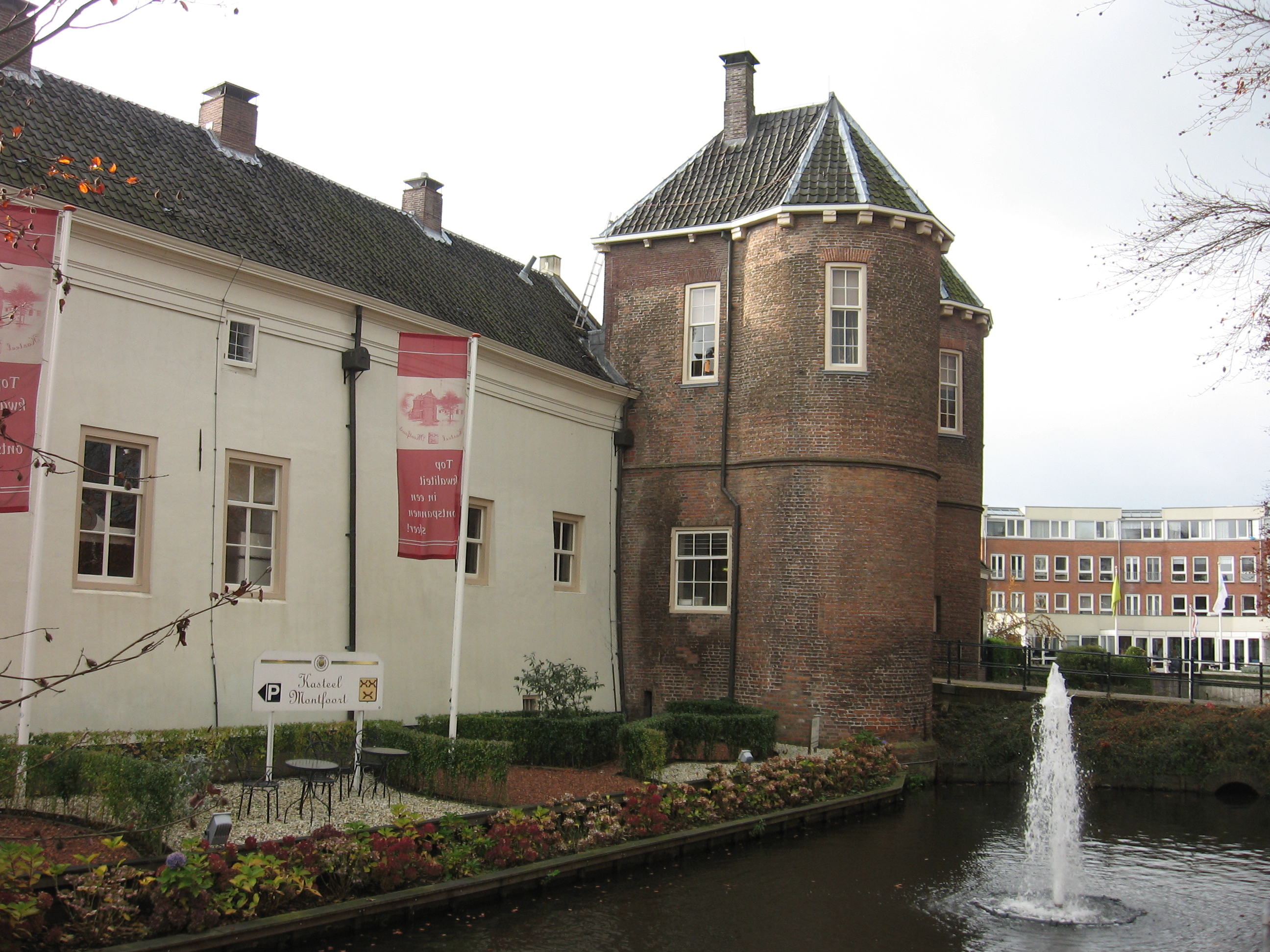 kasteel Montfoort